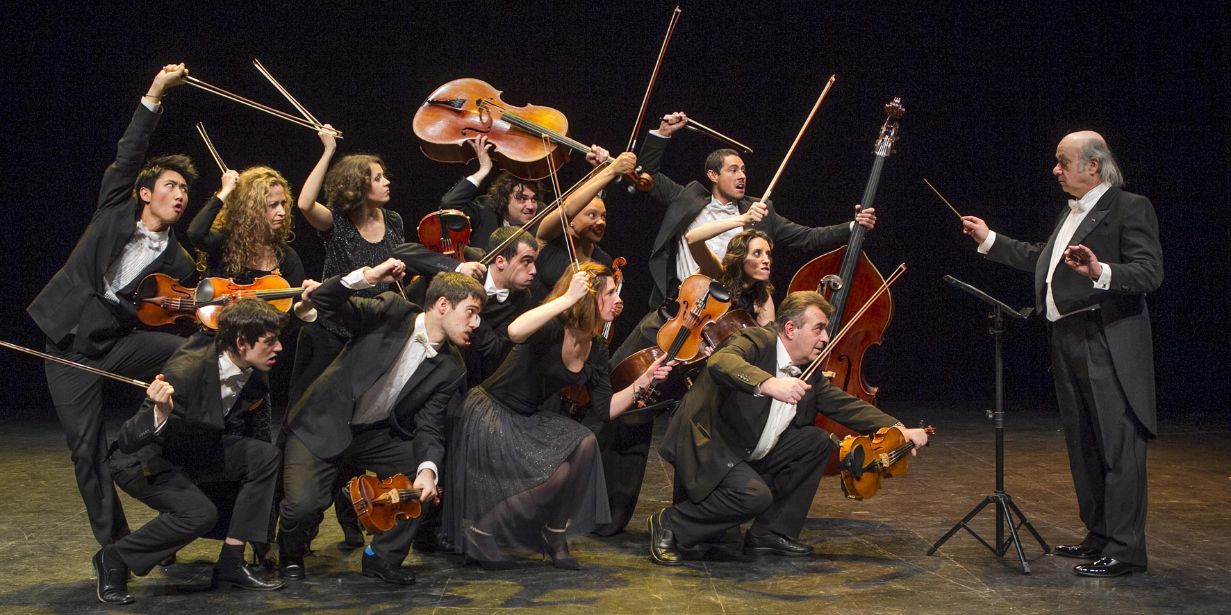 Formació actual de l´Orquestra de Cambra de l´Empordà